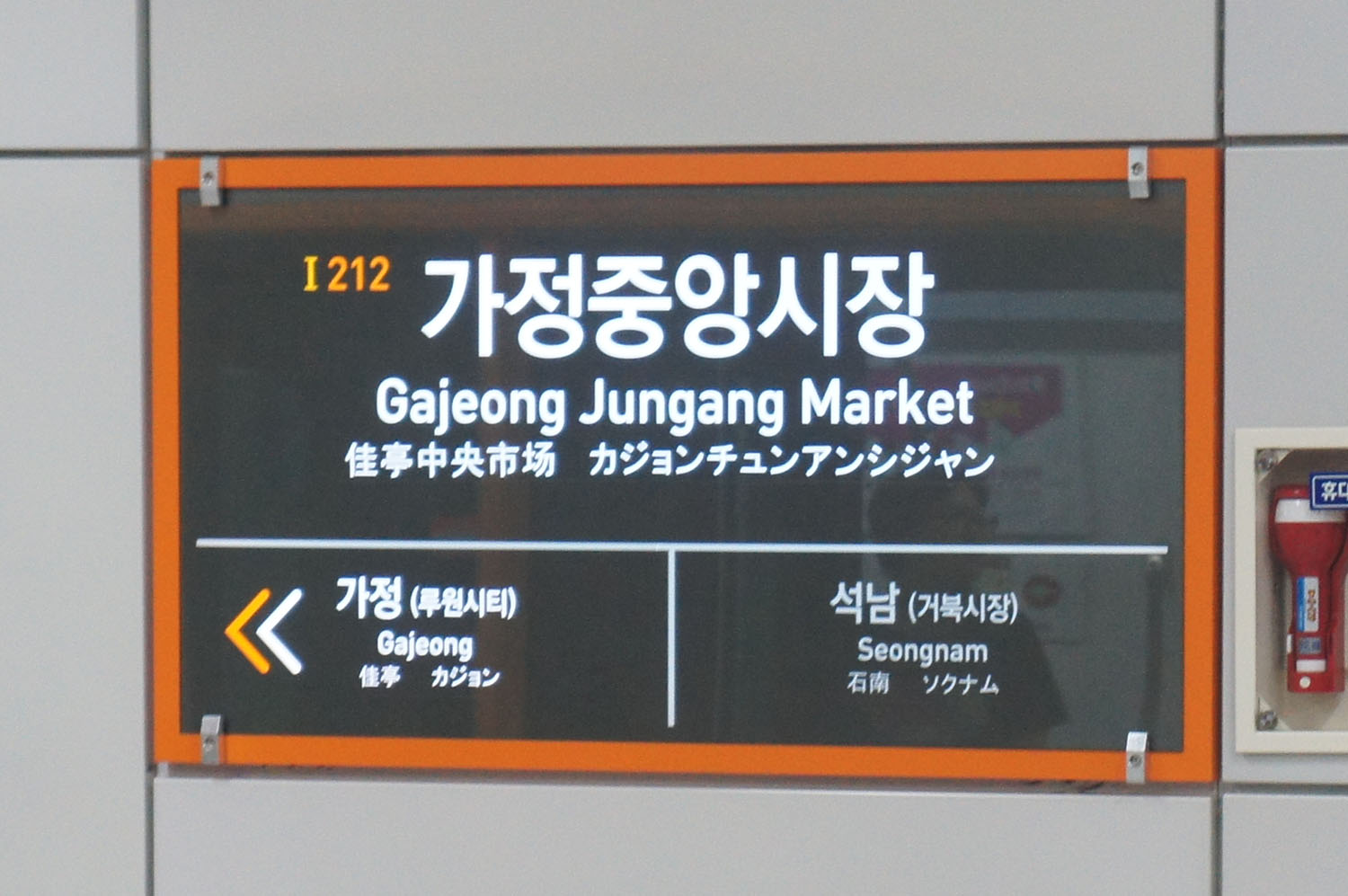 가정중앙시장 역명판